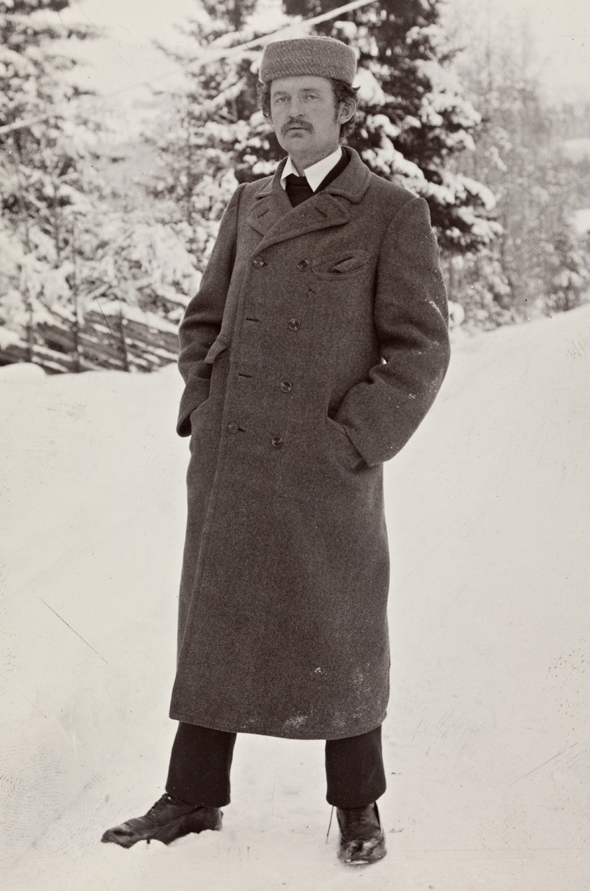 Tittel / Title: Portrett av Edvard Munch (1863-1944) Motiv / Motif: Kabinettkort. Fotografiet stammer fra Gyldendals historiske portrettarkiv. Dato / Date: ukjent / unknown Fotograf / Photographer: ukjent / unknown Eier / Owner Institution: Nasjonalbiblioteket / National Library of Norway Lenke / Link: Bildesignatur / Image Number: blds_04878